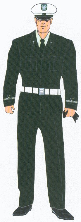 Inspektor Transportu Drogowego skan z Dz.U. z 2004 r. nr 30 poz. 258 Rozporządzenie Ministra Infrastruktury z dnia 6 lutego 2004 r. w sprawie umundurowania Inspekcji Transportu Drogowego.